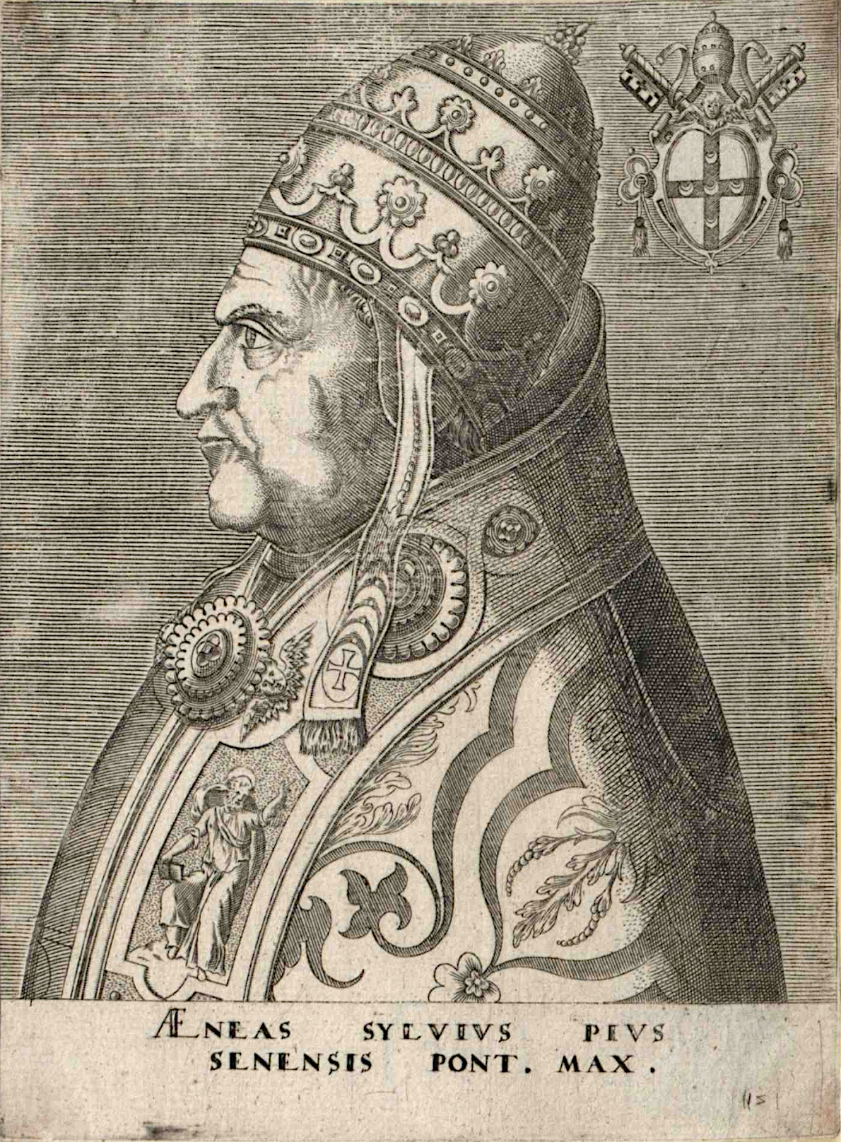 Pius II., papa (1405 - 1464)